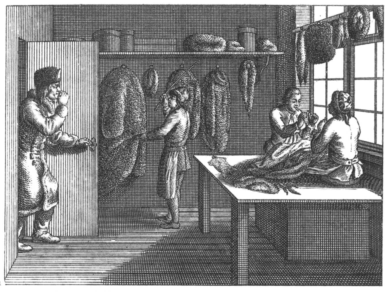 Tab. LV. Handwerke und Künste. a) Der Kürschner, welcher einen Pelz näht. Der Lehrbursche klopft einen Wildschur aus. An der Wand allerlei Pelzwerk; am Fenster eine Mütze, ein Paar Handschuhe und ein Fuchsschwanz. Der frostige Käufer. (Beschreibung lt. Quelle)